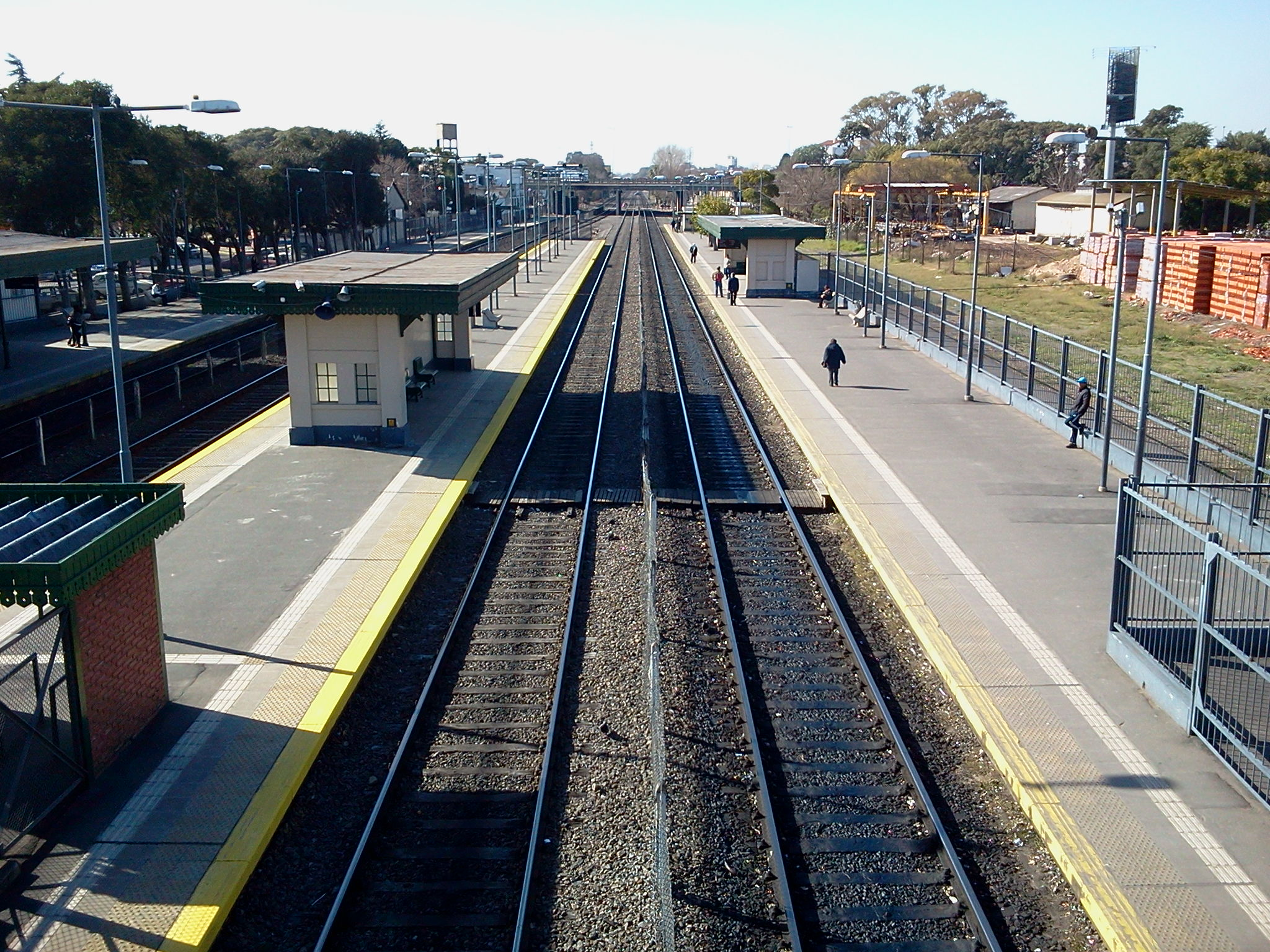 Andenes 1